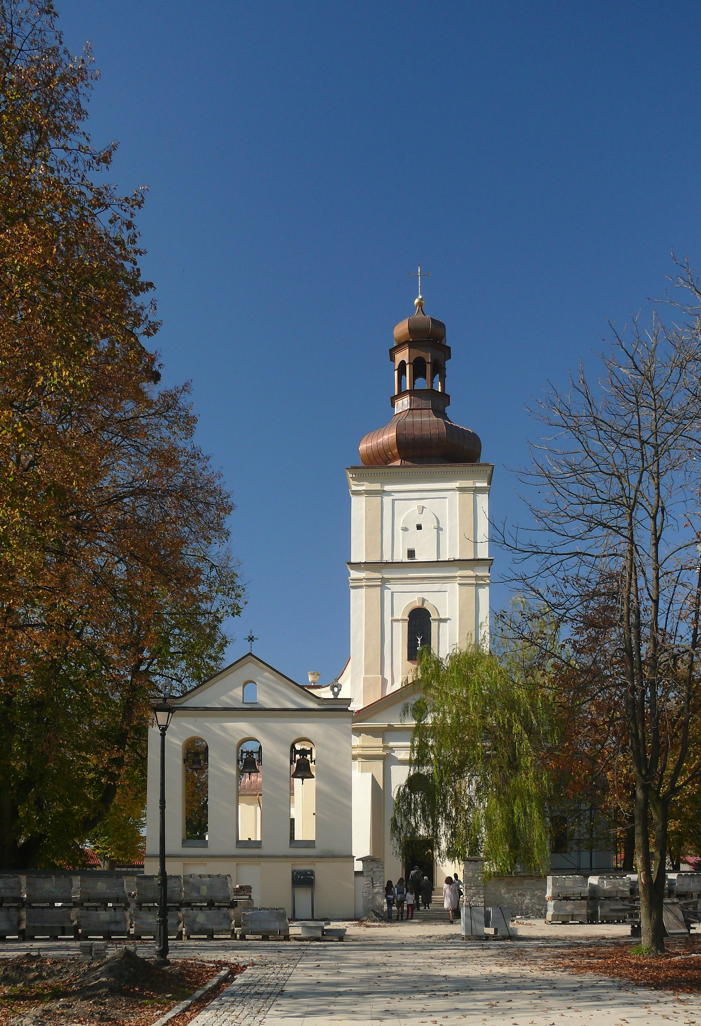 widok na kościół parafialny w Narolu, woj. podkarpackie